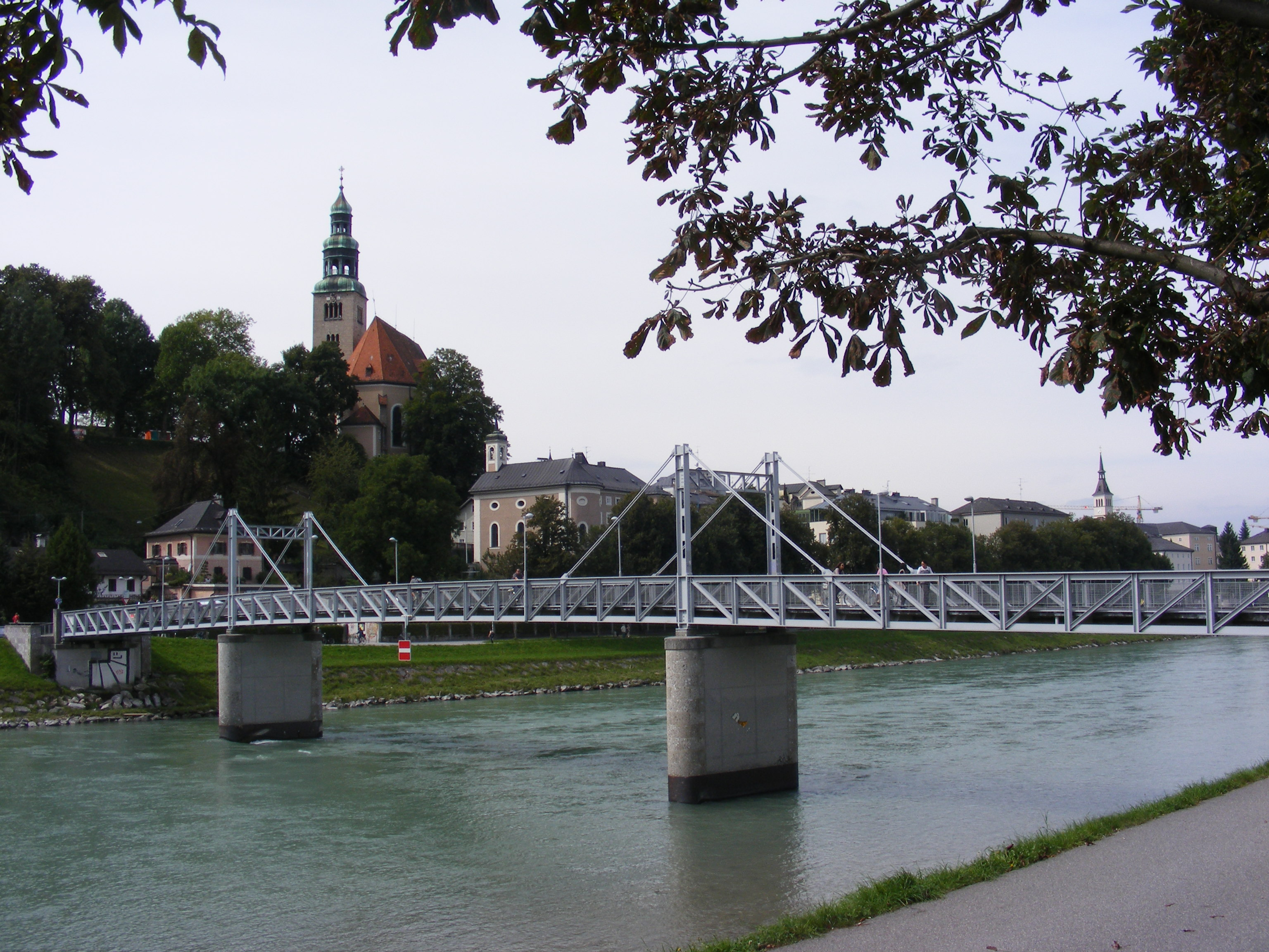 Fußgänger- und Radfahrerbrücke Müllnersteg in Salzburg